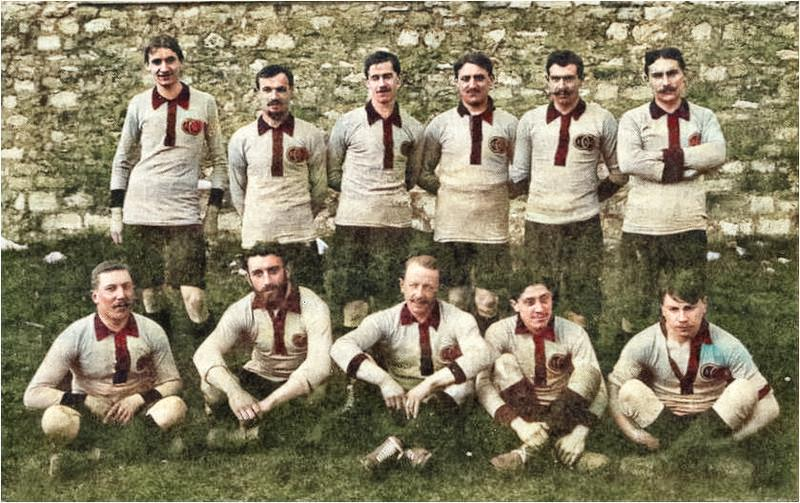 Equipe de football del'Amiens Athlétic Club en 1910. Assis : Sellier, Fernand Petit, Henri Holgard, Duroselle, Cotté Debout : Jacques Moulonguet, Robert Poiré, un Anglais (nom inconnu), Leleu, Henri Petit